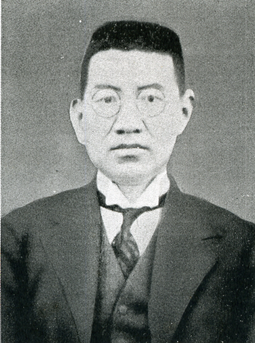 この写真は、難波清人（1888-1940）の写真です。